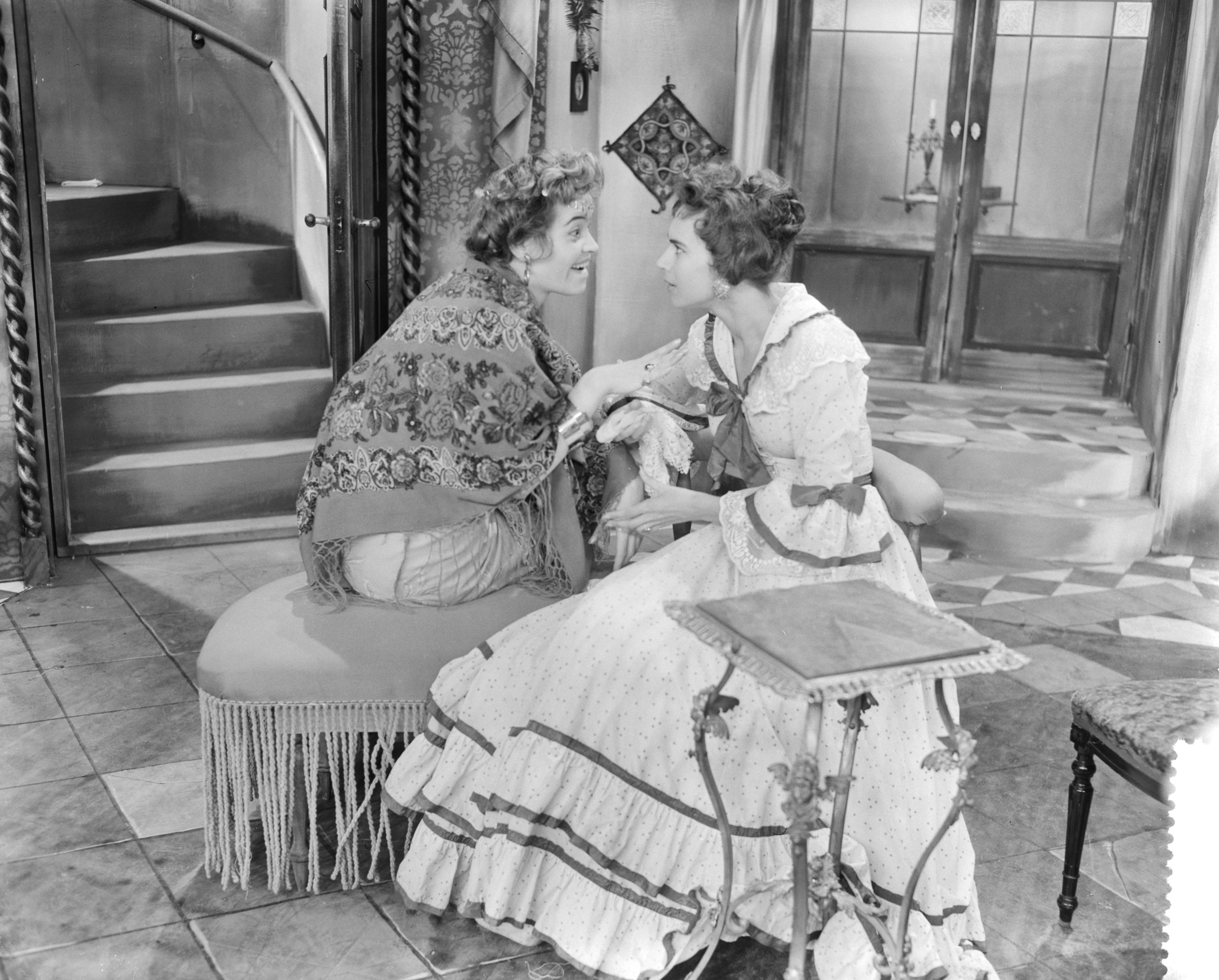 Collectie / Archief : Fotocollectie Anefo Reportage / Serie : [ onbekend ] Beschrijving : Opname van de repetitie van "De Zotskap" van Pirandello in de TV-studio in Bussum, Sigrid Koetse als Beatrice, jaloerse echtgenote, Dini de Neef (links) als roddelaarster Datum : 14 mei 1959 Locatie : Bussum Trefwoorden : televisiedrama's Persoonsnaam : Koetse, Sigrid, Neef, Diny de Fotograaf : Behrens, Herbert / Anefo Auteursrechthebbende : Nationaal Archief Materiaalsoort : Negatief (zwart/wit) Nummer archiefinventaris : bekijk toegang 2.24.01.04 Bestanddeelnummer : 910-3698